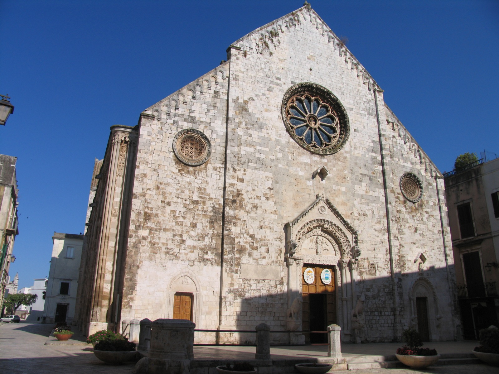 Conversano, Puglia, Italia